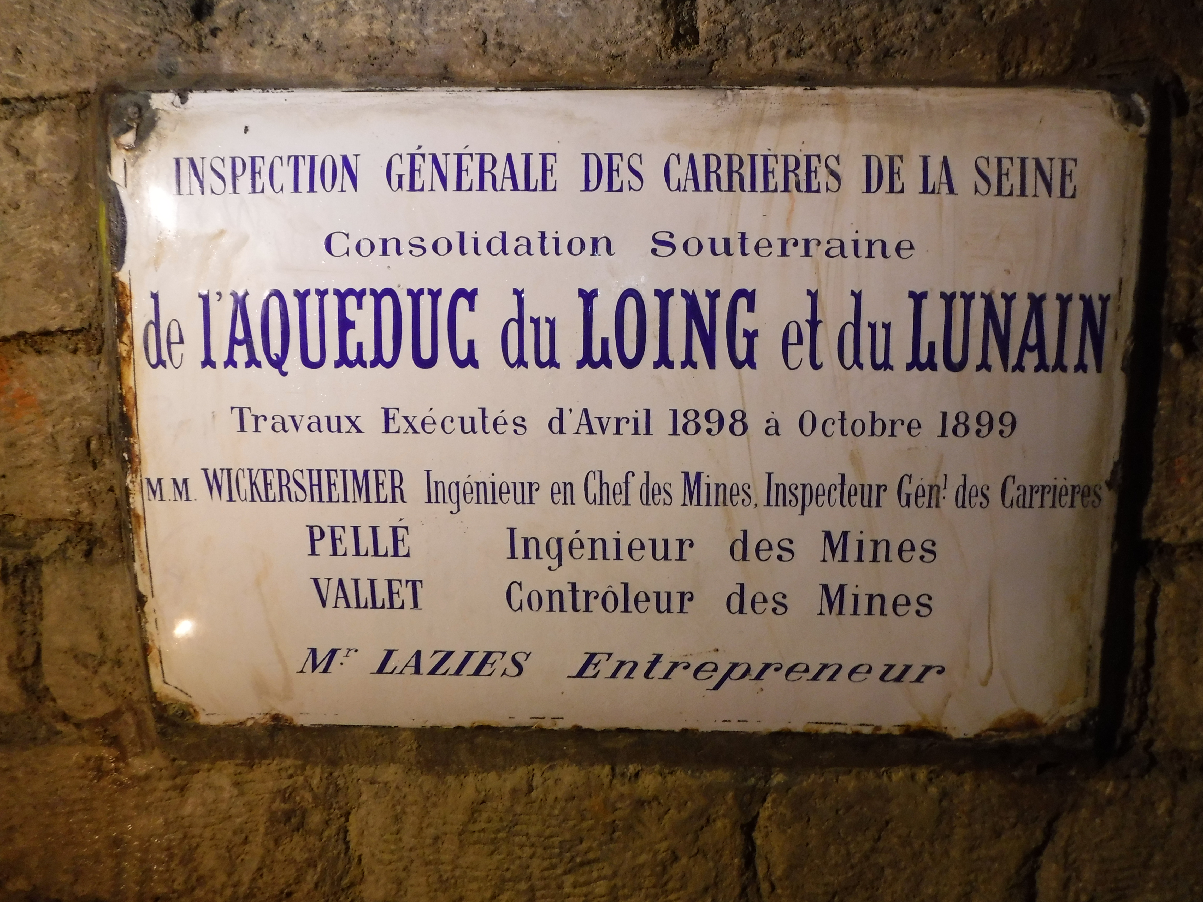 Plaque émaillée de l'aqueduc du Loing et du Lunain, conçu par Charles Wickerscheimer